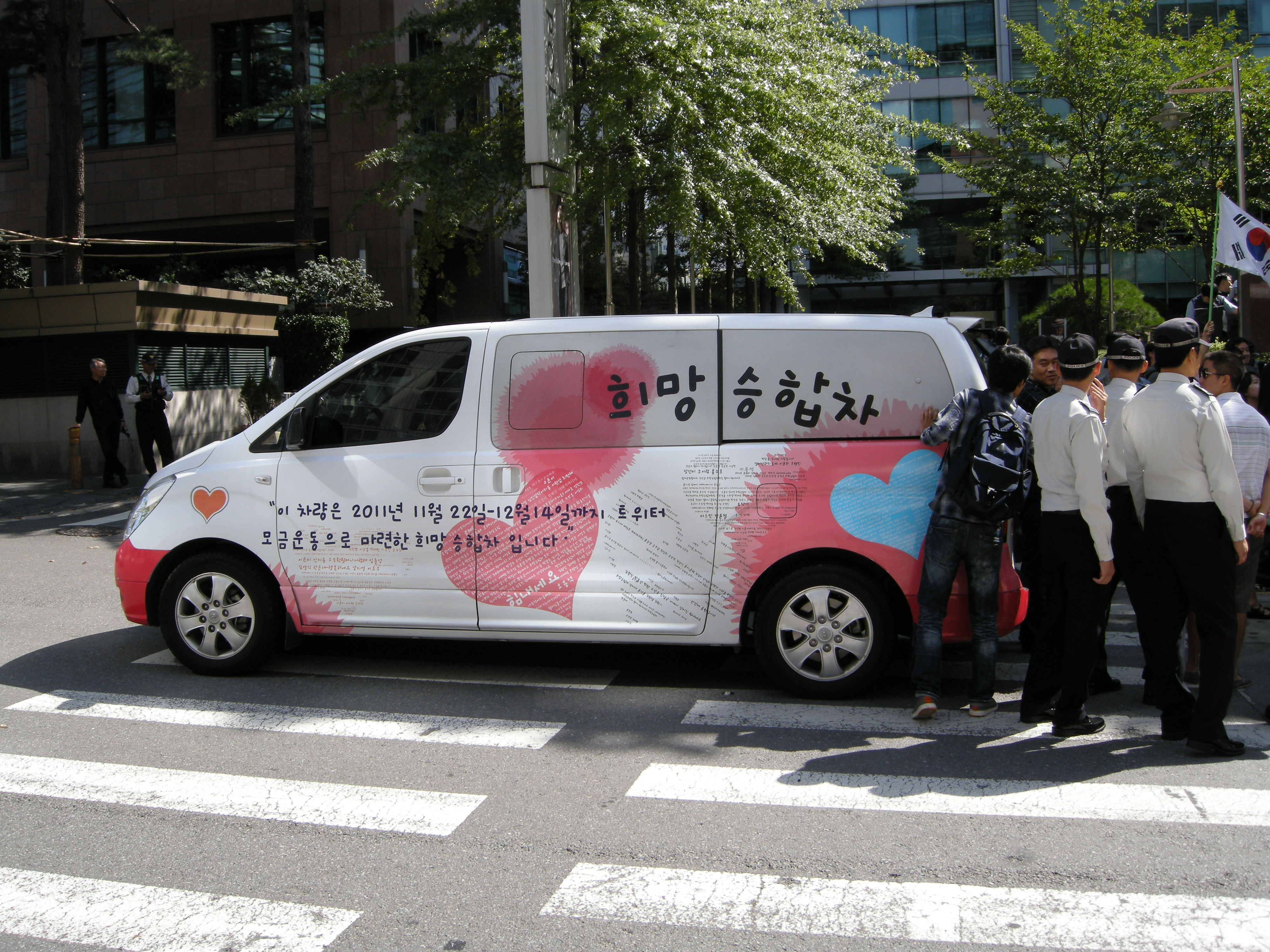 위안부 피해 할머니들을 위한 희망승합차